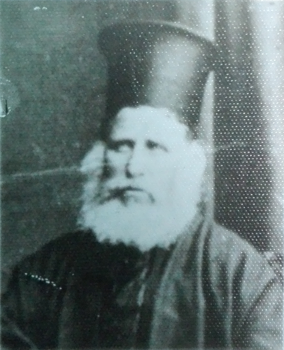 поп Кузман Андреев Синков